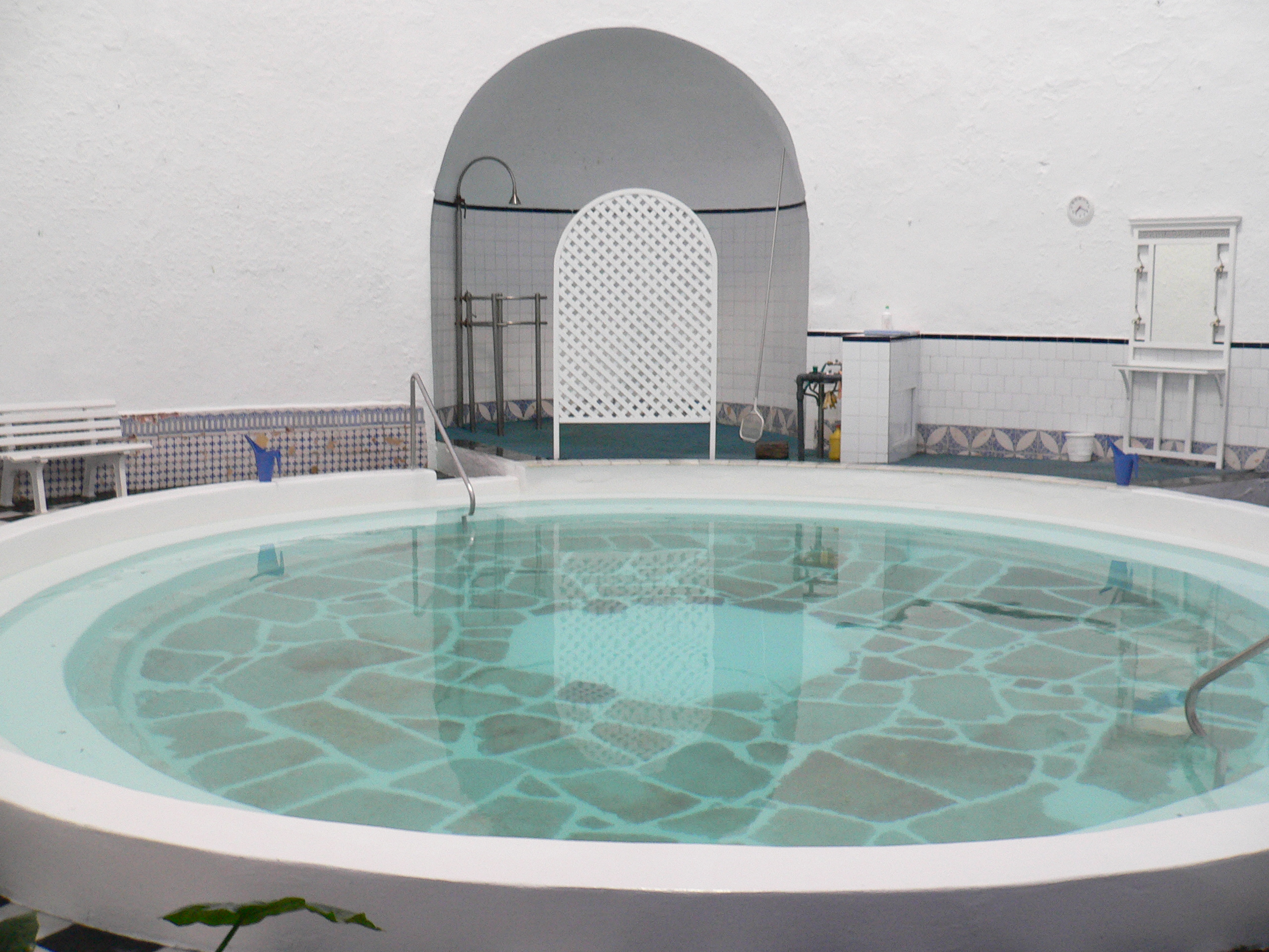 Una de las piscinas de los baños romanos de Alange.